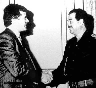 Carlos Cardoen meets with Iraqi Leader Saddam Hussein.